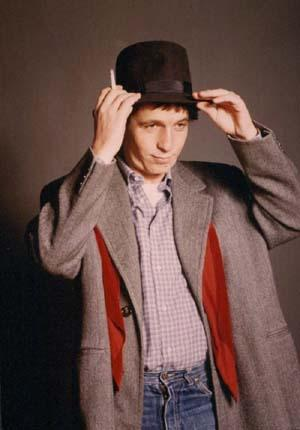 Il primo album «Ingresso Libero» del 1974 passa inosservato. Il successo arriverà l'annodopo con il singolo-pietra miliare «Il cielo è sempre più blu».